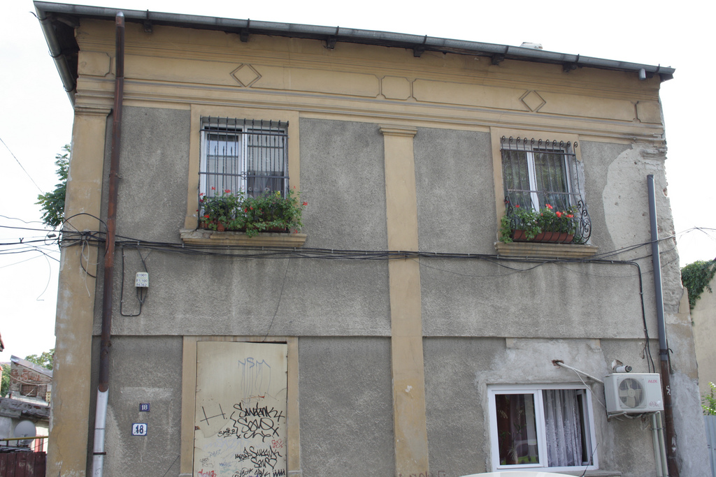 Casă, Str. Sevastopol 18 sector 1